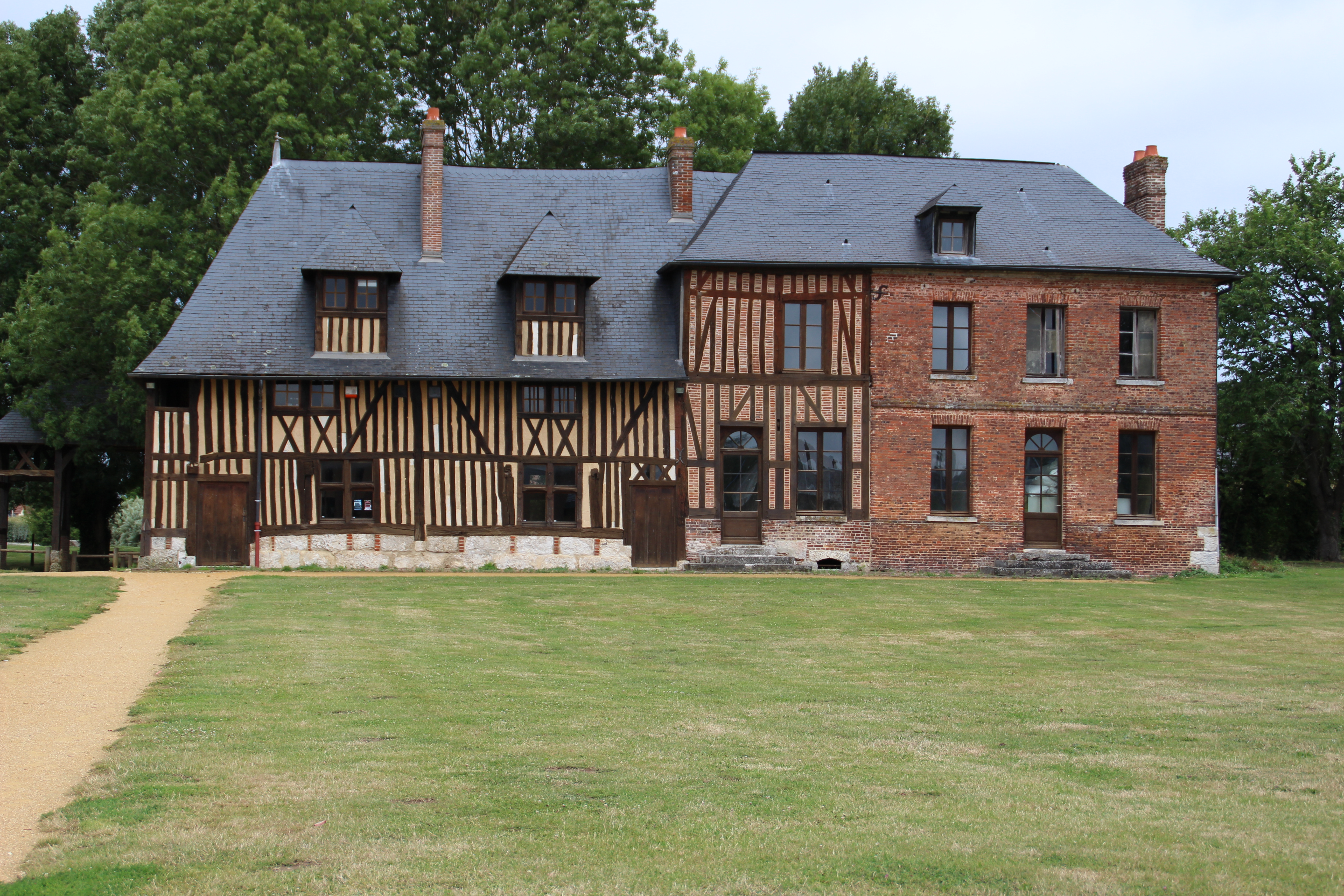 En centre bourg, le manoir Dorival.